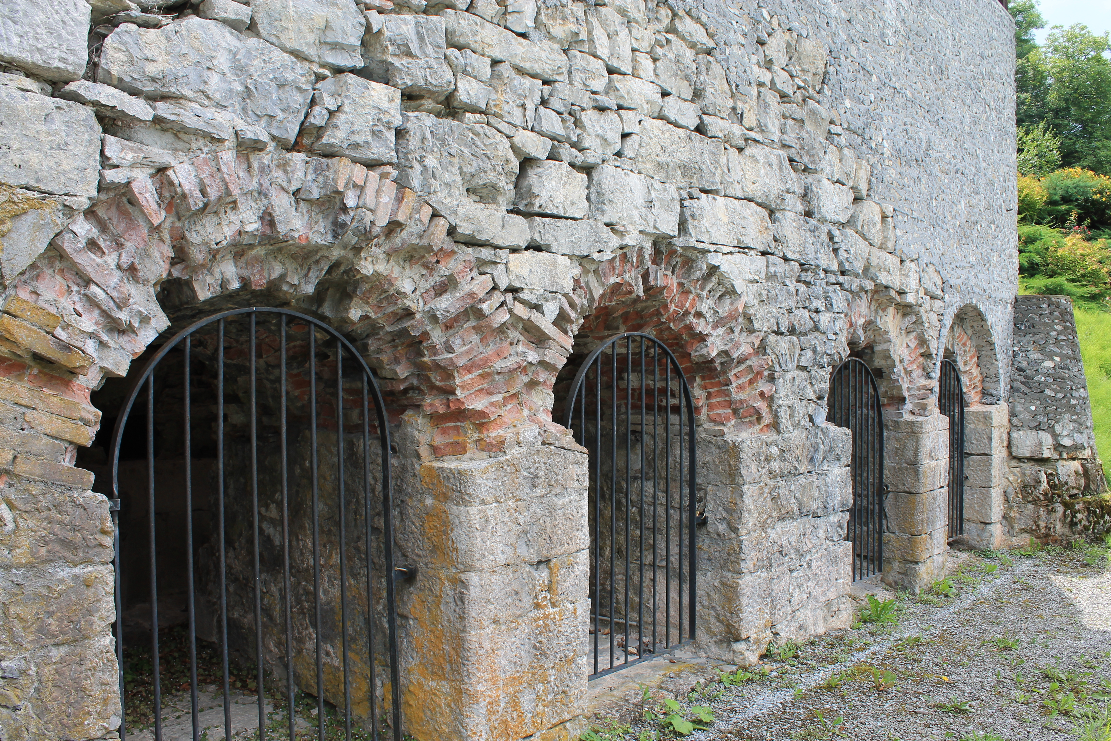 Fours à chaux (XVIII-XIXe siècles) de Cons-Sainte-Colombe rénovés en 2003-2004 - Accès aux fours (cuves)